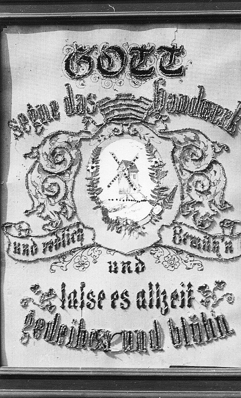 Original image description from the Deutsche Fotothek Wermsdorf-Luppa. Windmühlengehöft? Stickbild mit Mühlendarstellung